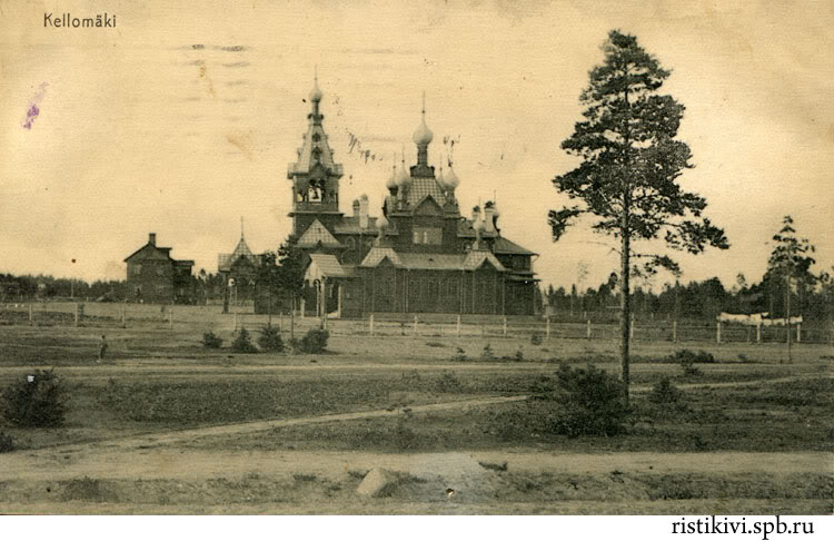 Утраченная в 1917 году Святодуховская церковь в посёлке Комарово ранее называвшимся Келомяки